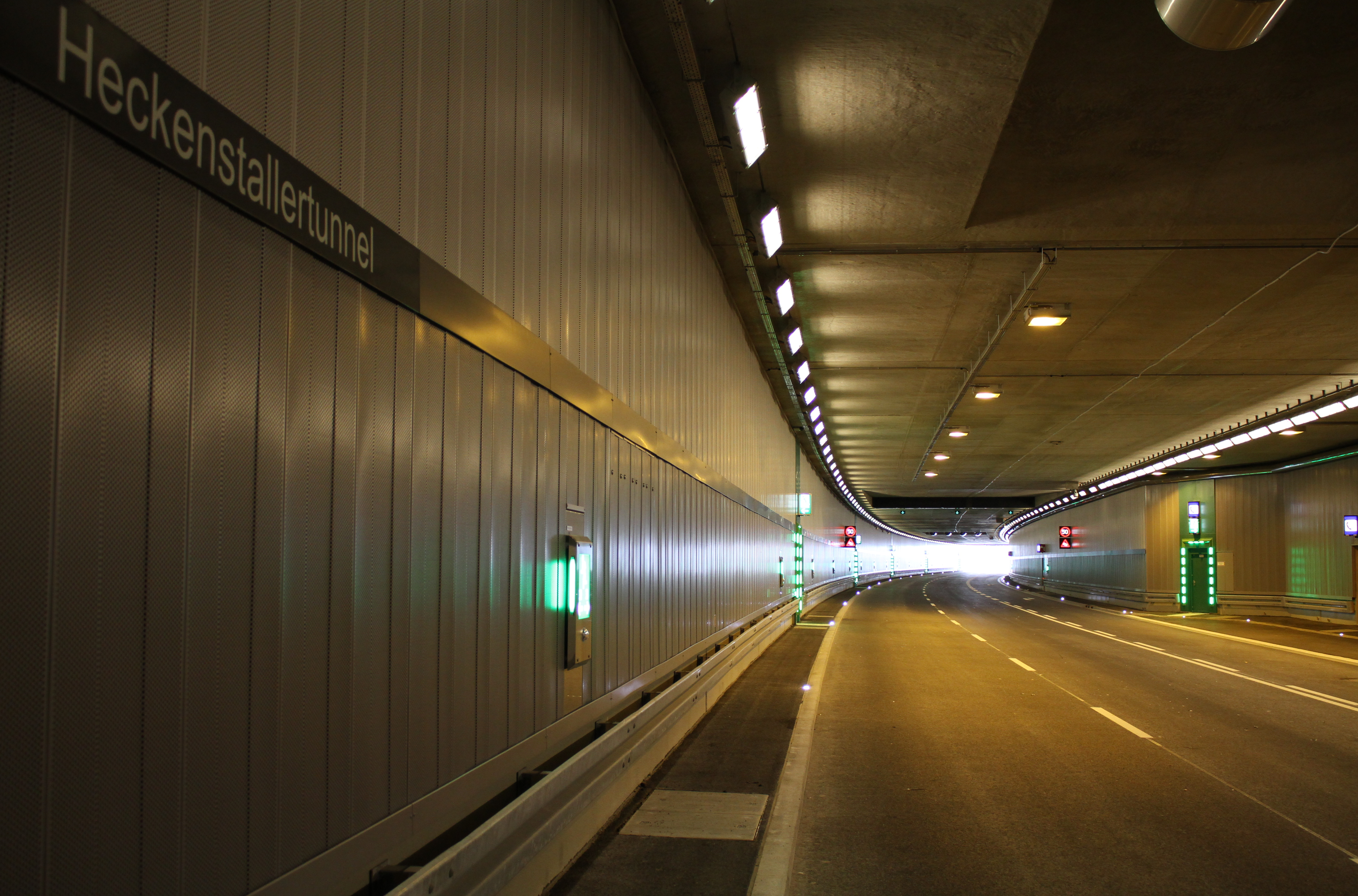 Heckenstaller-Tunnel des Mittleren Rings